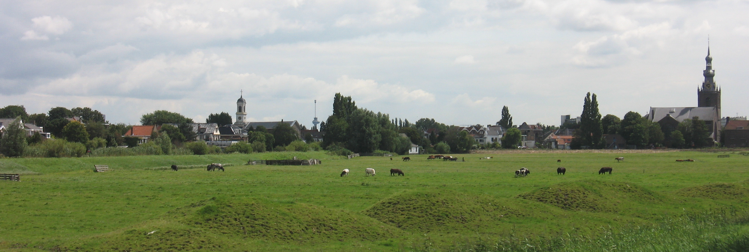 Polder bij Kethel, zicht op Overschie